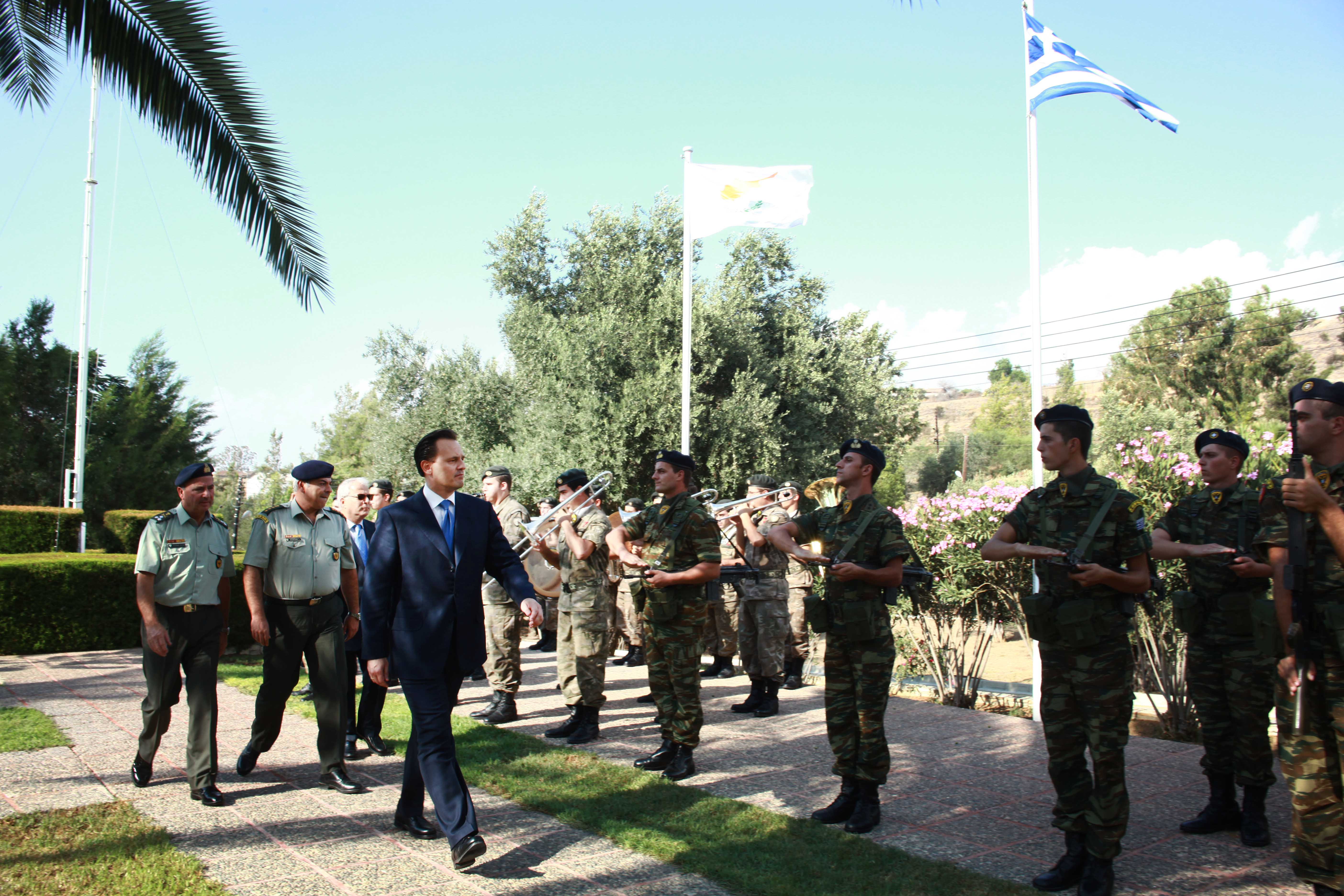 Στο πλάισιο της επίσκεψης του στην Κυπρο στις 8-9-/09/2010, ο ΥΠΕΞ κ. Δ. Δρούτσας επισκέφθηκε την ΕΛΔΥΚ